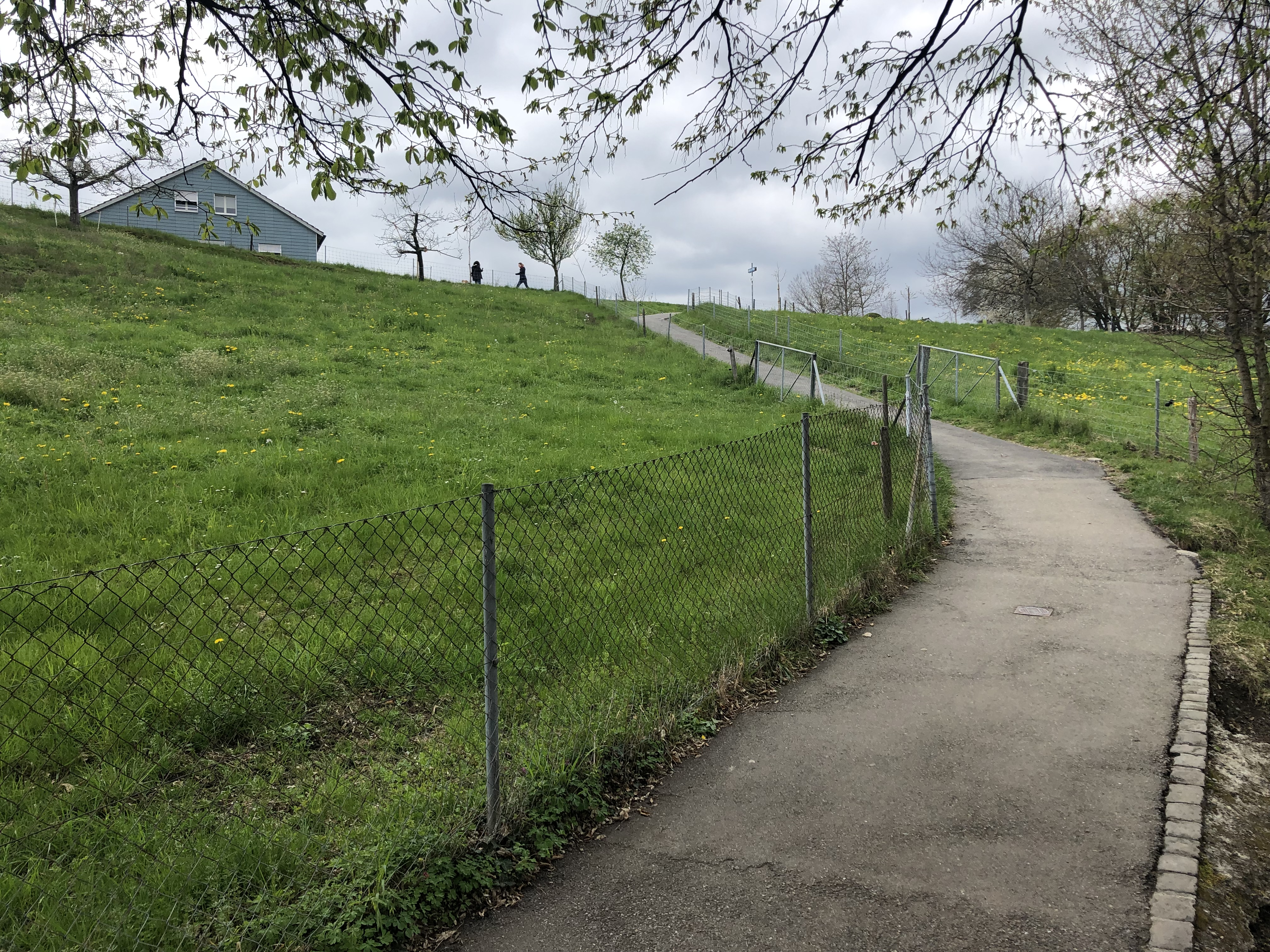 Wollishofen Erdbrustweg